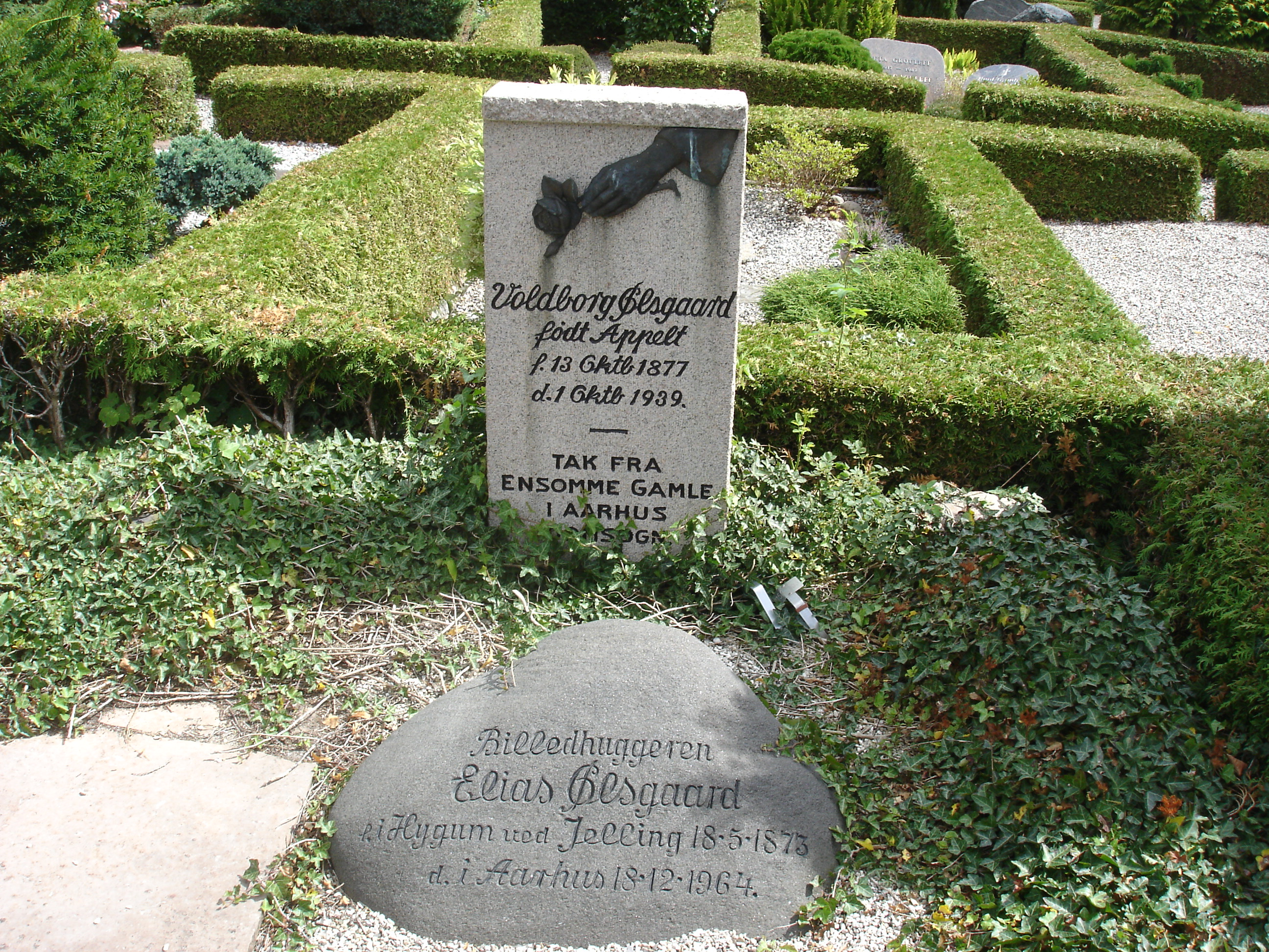 Voldborg og Elias Ølsgaards gravsten på Mørke Kirkegård